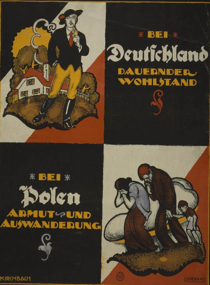 Bei Deutschland dauernder Wohlstand; bei Polen, Armut und Auswanderung